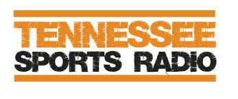 TSR Logo